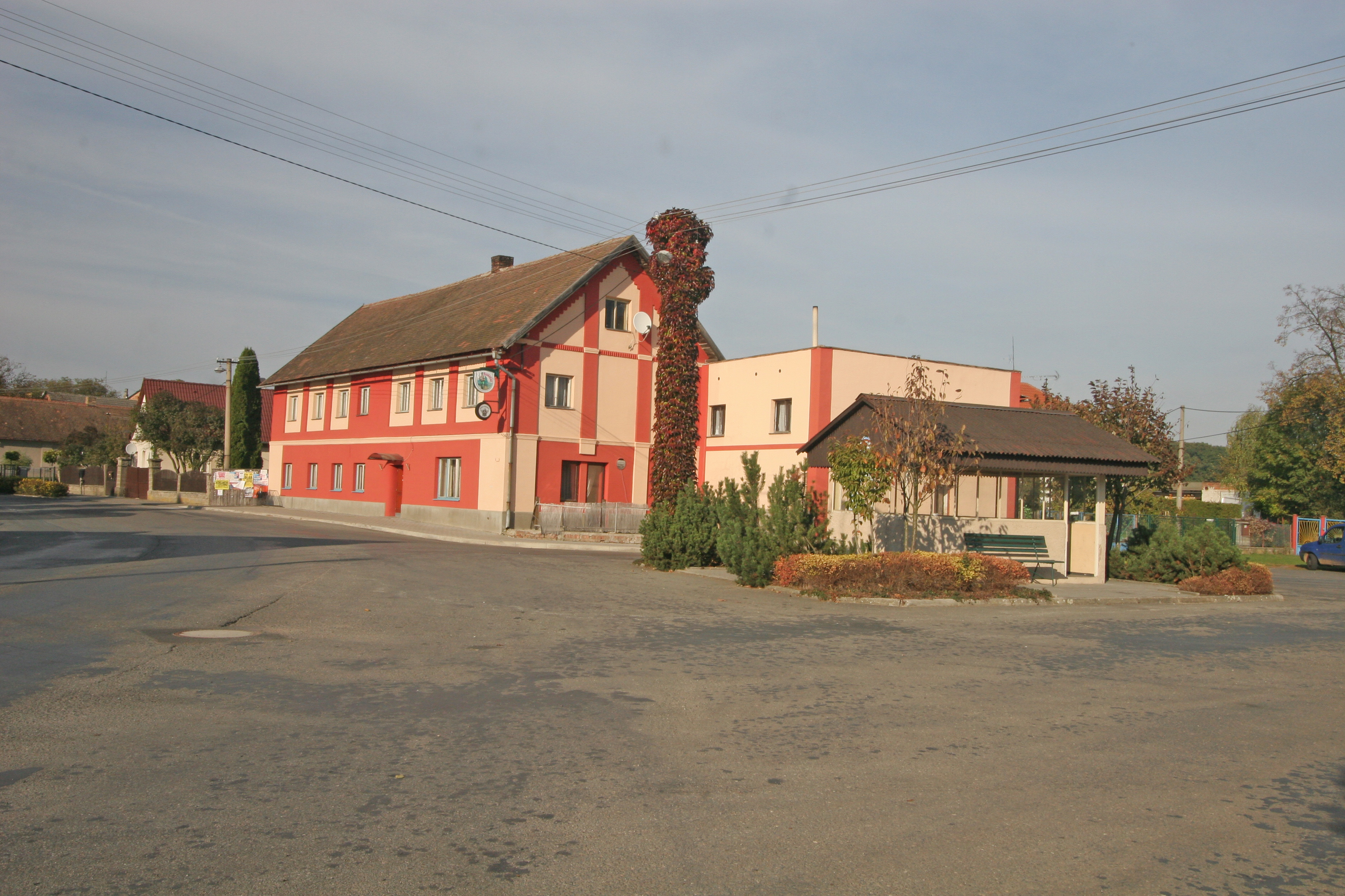 Jílovice hospoda